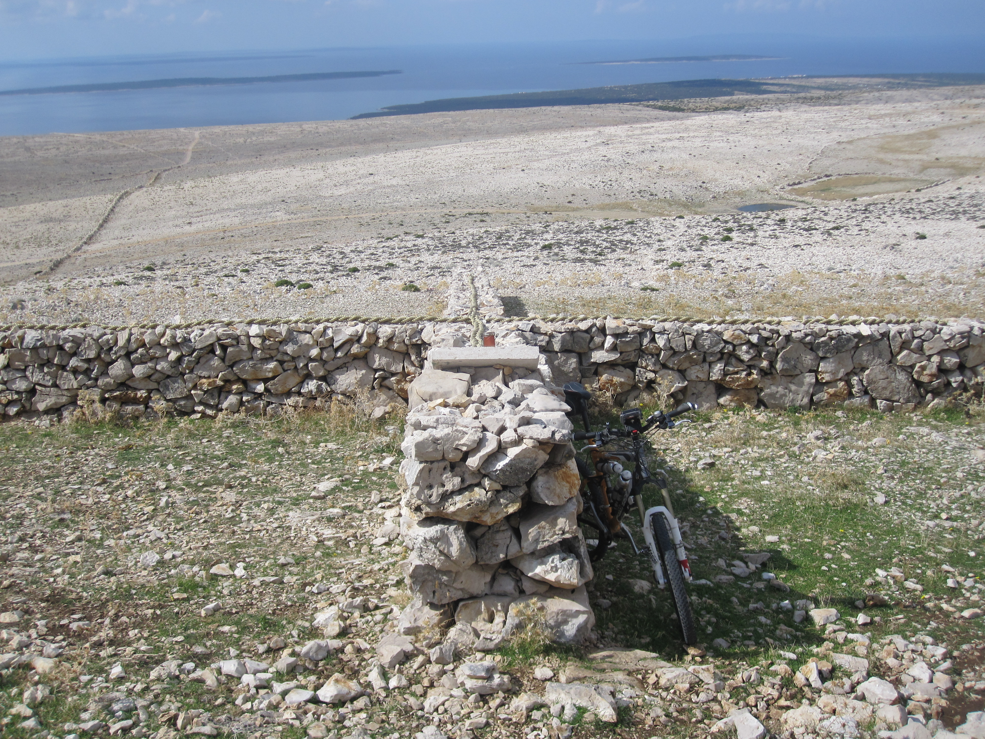 Pag, Croatia